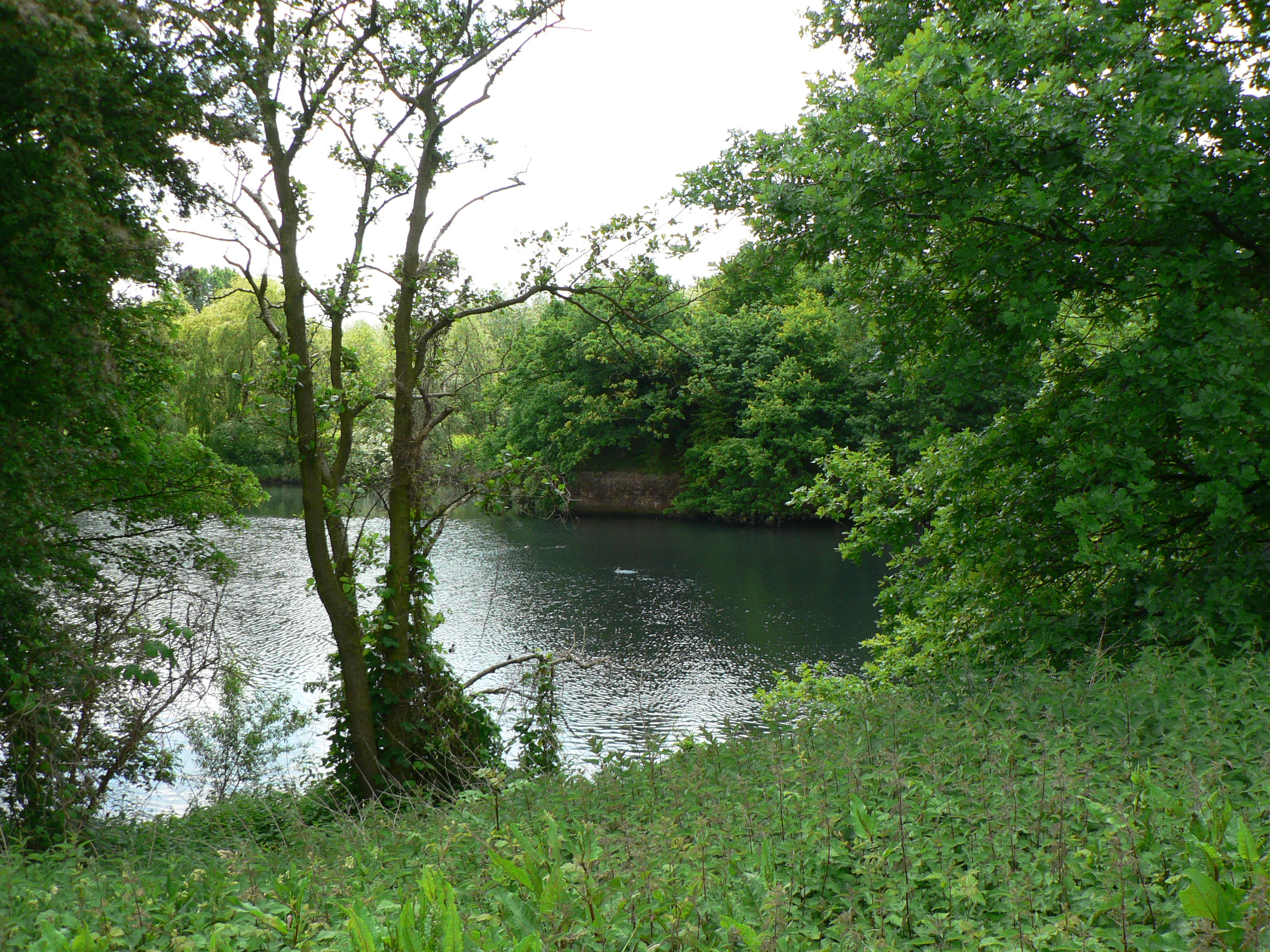 Fort III, Borsbeek, Antwerpen, Belgium